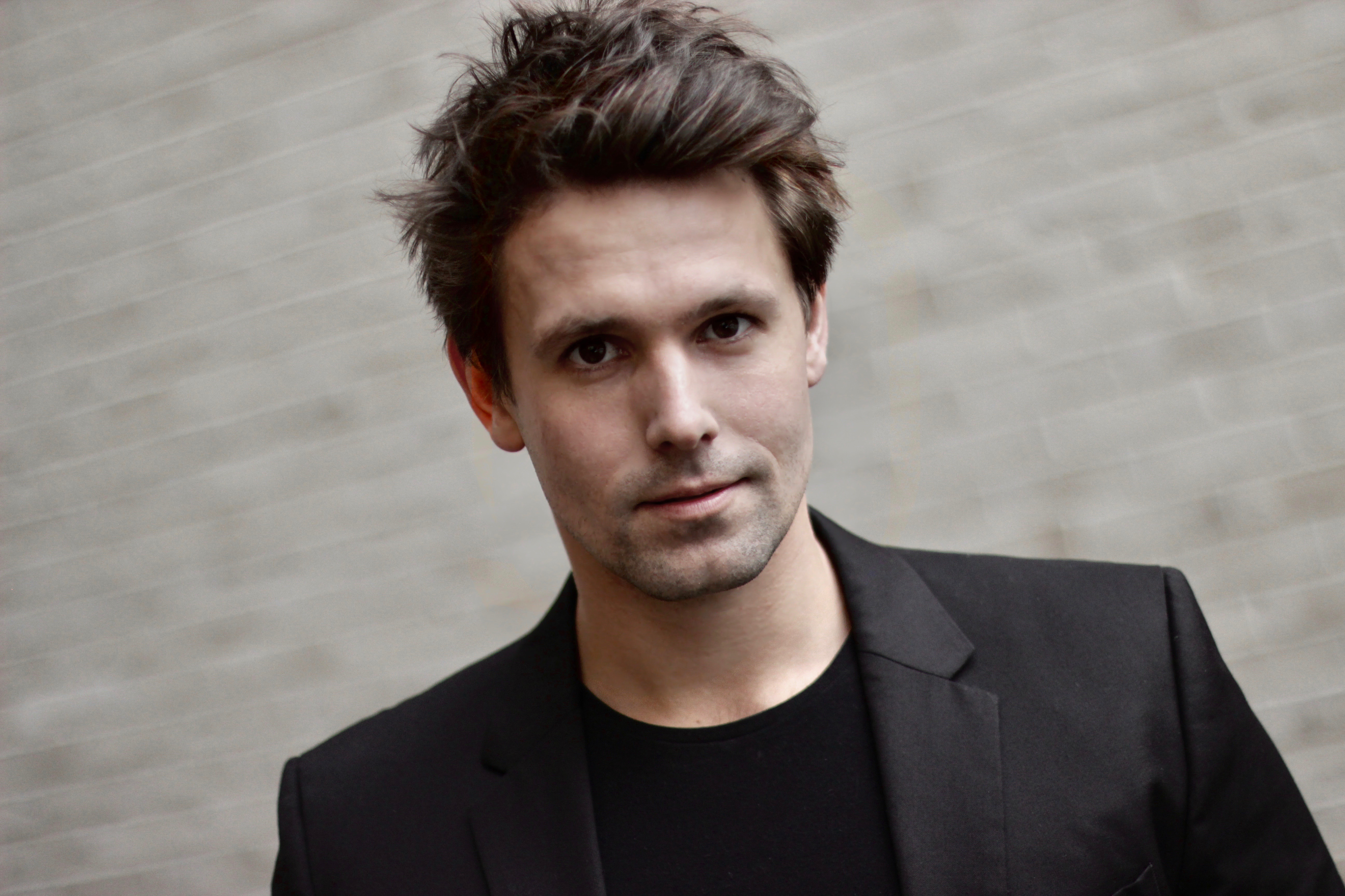 © Julian Mau